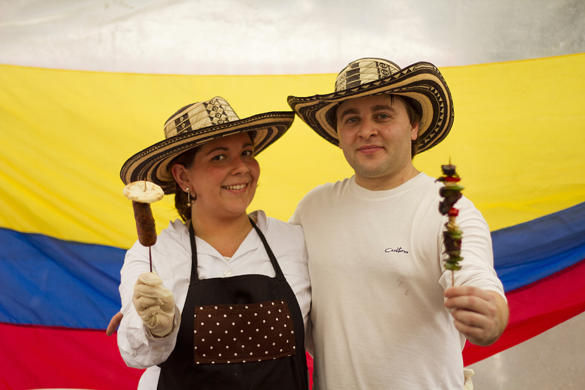 Las colectividades celebran la patria